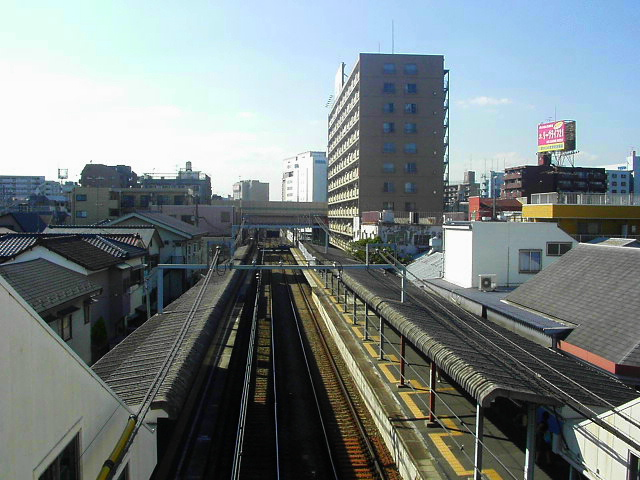 穴守稲荷駅 撮影位置: 東京都、大田区、羽田4丁目。駅のホーム連絡橋から。 撮影日: 2004年9月14日。 撮影者: Kinori（投稿者と同じ）。 画像形式: JPEG形式、640x480ピクセル、色数24bit。